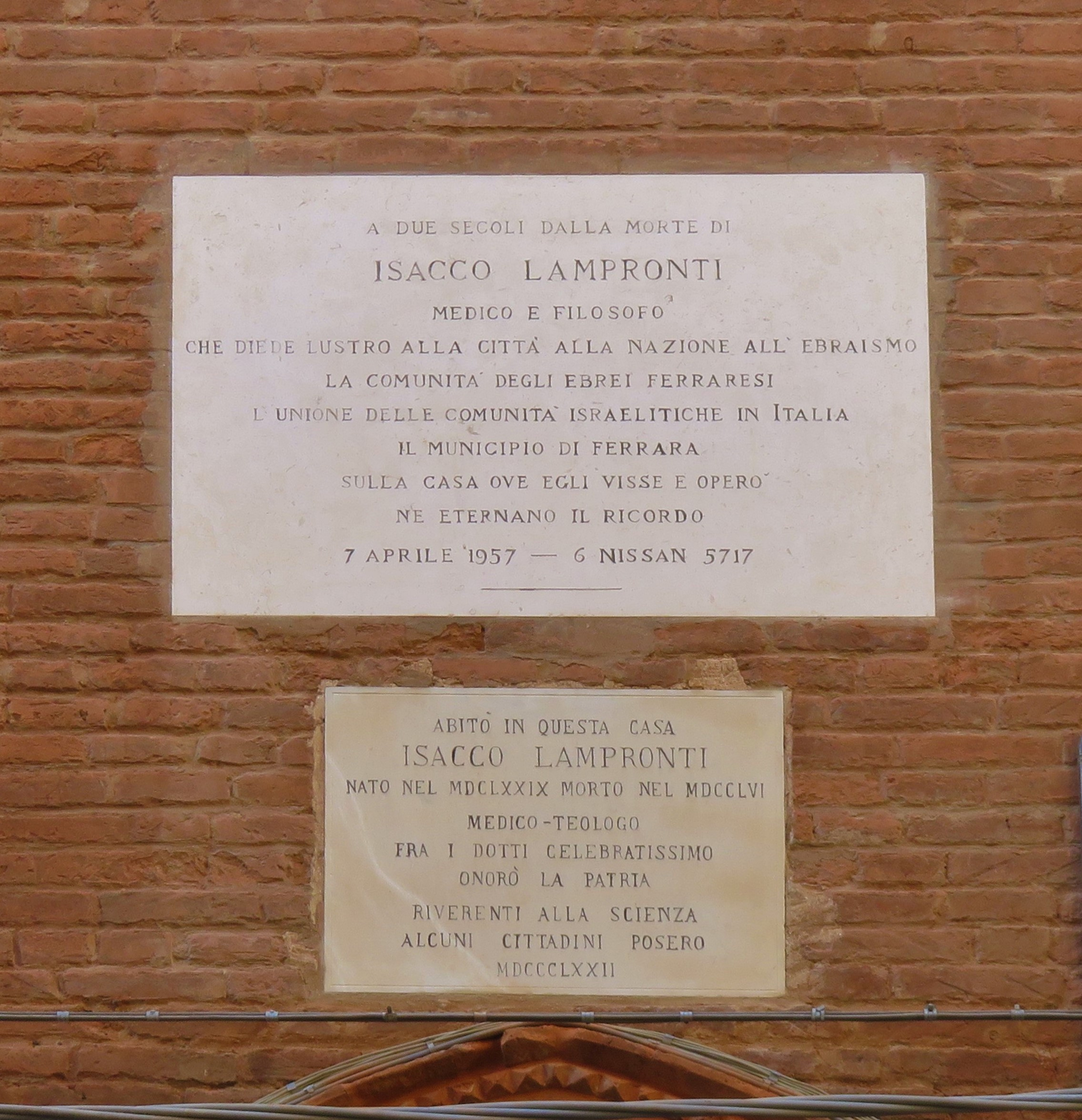 Ex ghetto ebraico di Ferrara - Casa di Isacco Lampronti in Via Vignatagliata 33 - Epigrafi sopra l'ngresso.